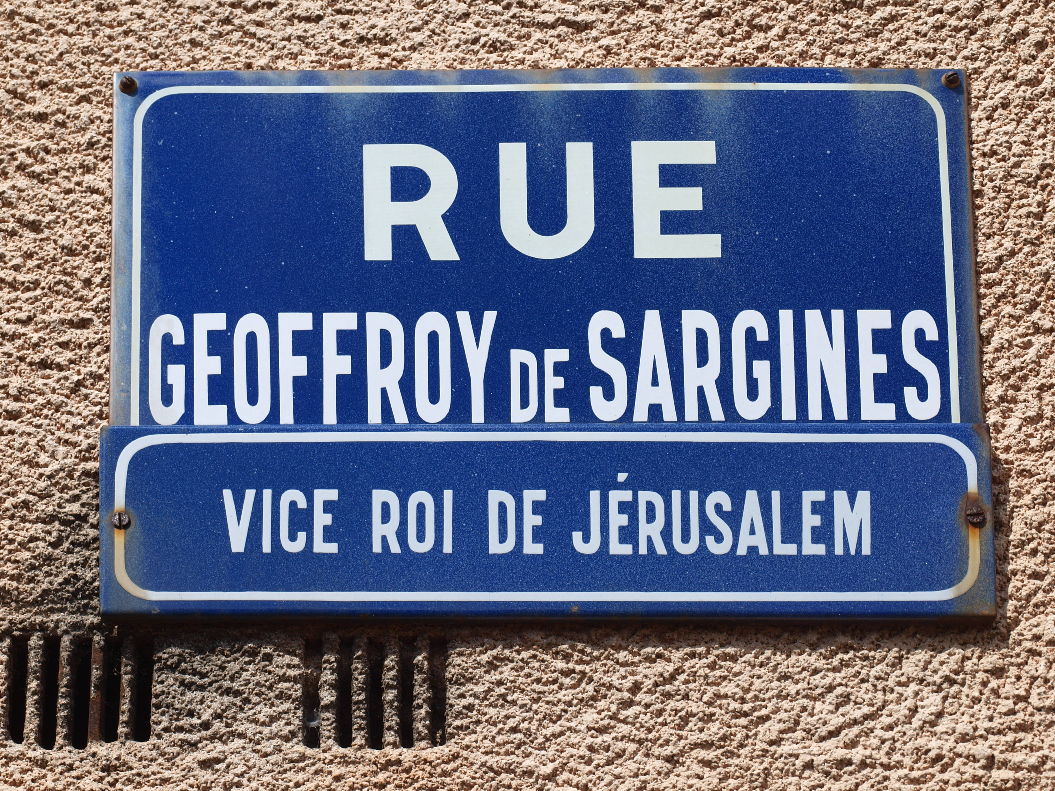 Sergines (Yonne, France) ; plaque de rue à la gloire de Geoffroy de Sergines.